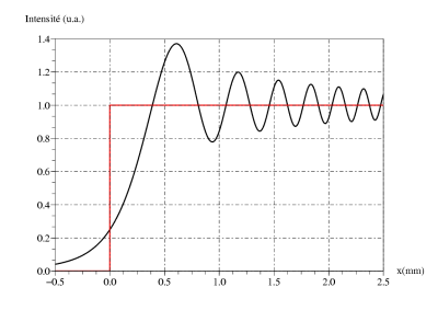 Courbe donnant l'intensité diffractée par un bord d'écran. Domaine public